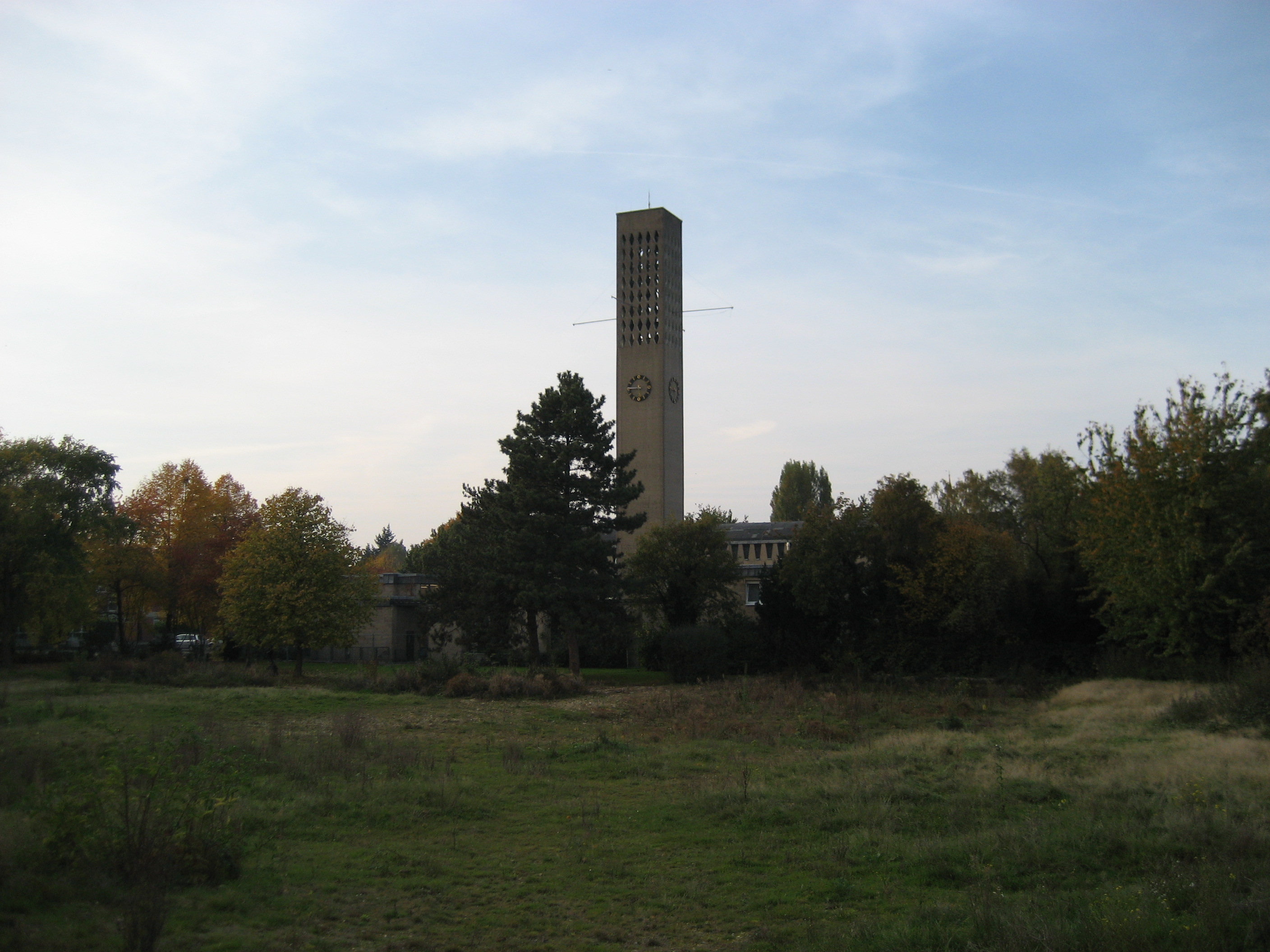 St. Josef in der Südstadt von Grevenbroich. Zu sehen ist der Kirchturm sowie ein Teil der Kirche.